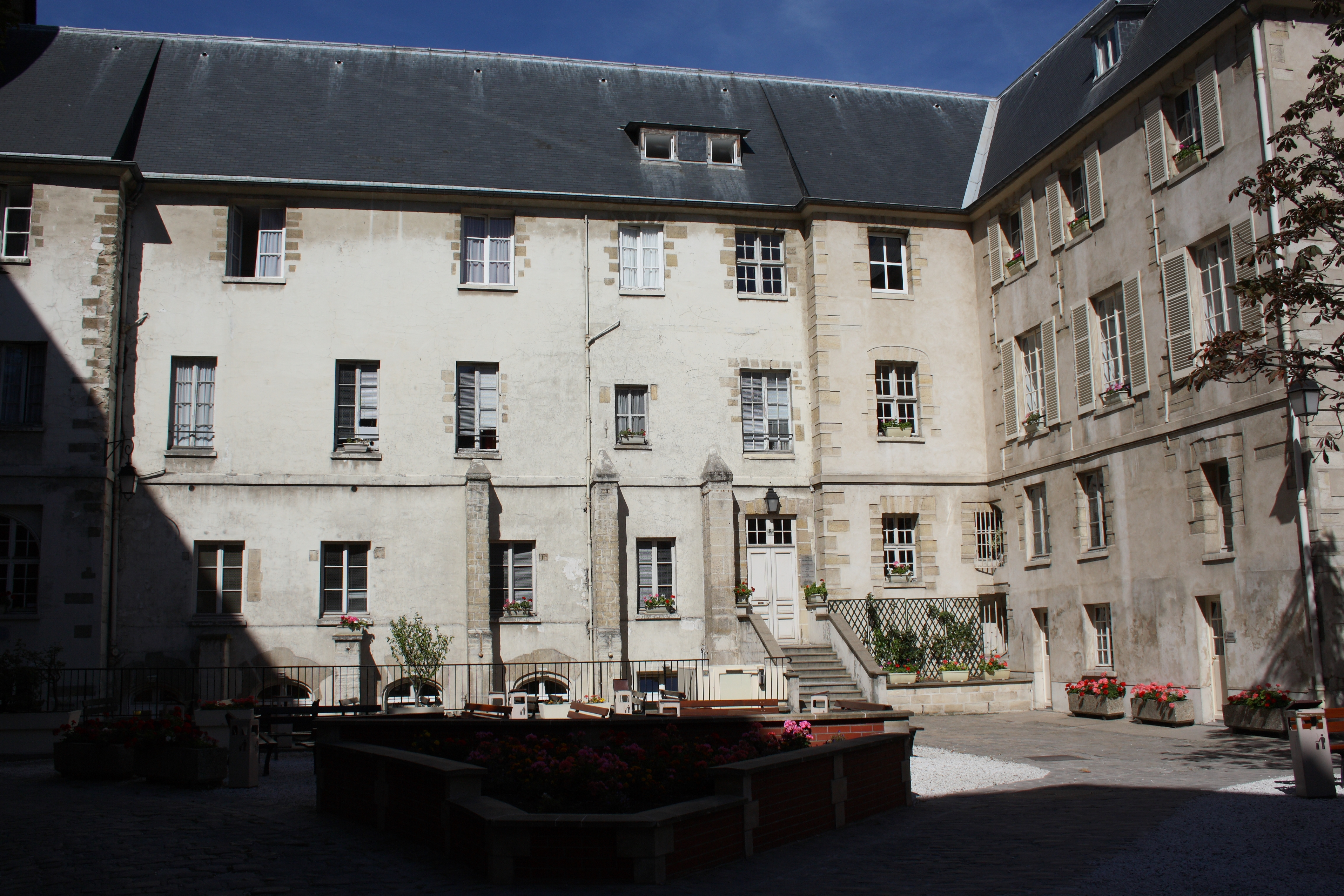 Institut Catholique, ehemaliges Kloster der Unbeschuhten Karmeliten (Couvent des Carmes), 21, rue d'Assas/70, rue de Vaugirard im 6. Arrondissement von Paris